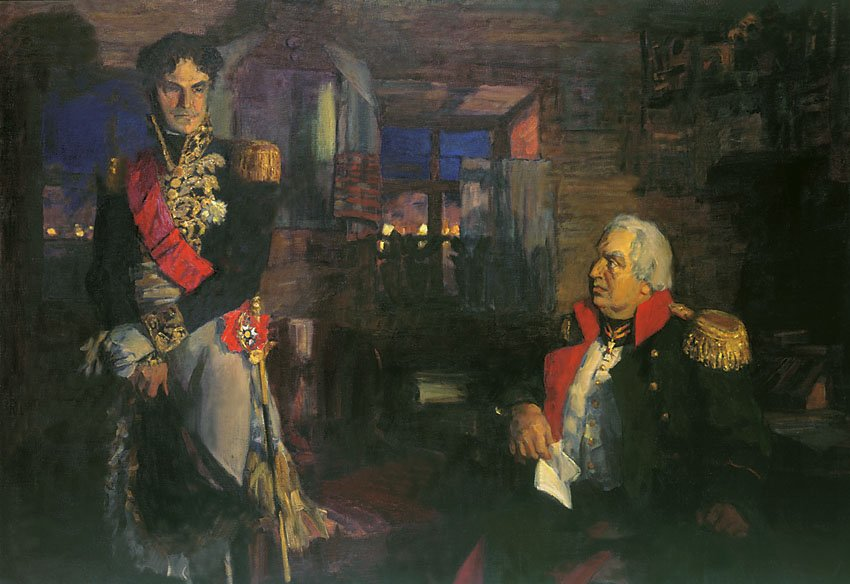 Rencontre de Lauriston et Koutousov, le 5 octobre 1812 dans un quartier général de campagne. Лористон в ставке Кутузова. Холст, масло. 163 x 224 см Государственная Третьяковская галерея, Москва